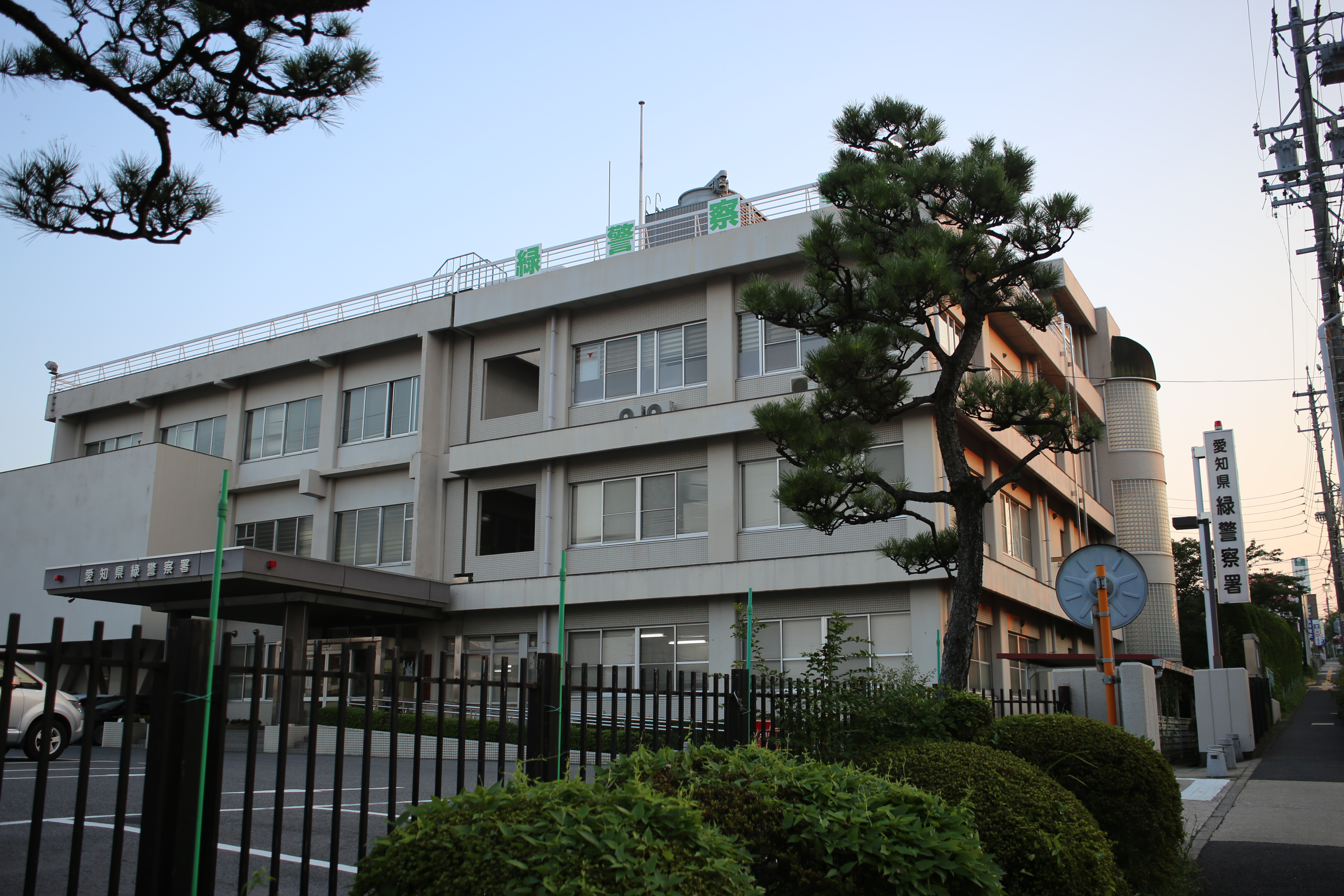 名古屋市緑区青山の愛知県警察緑警察署を北側公道東側より撮影